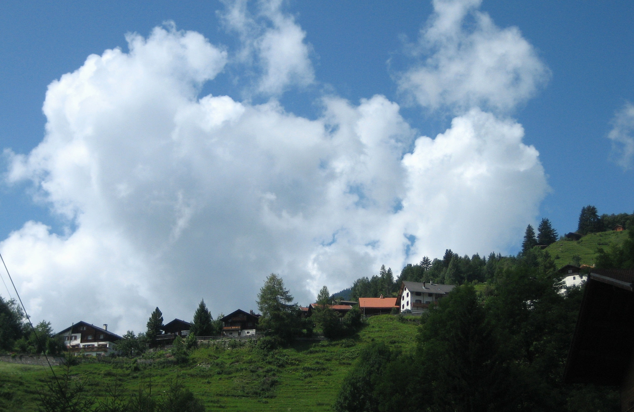 Pagig